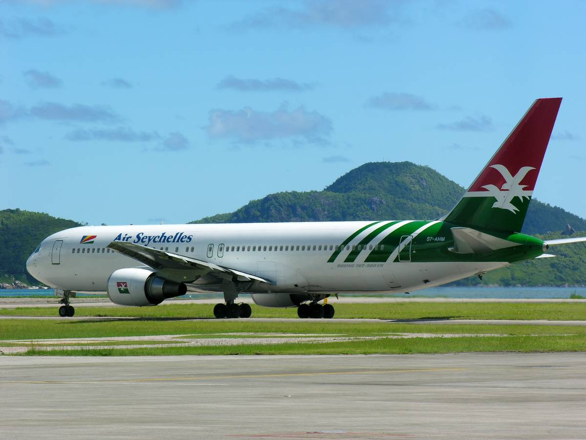 Seychelles, Mahé Island